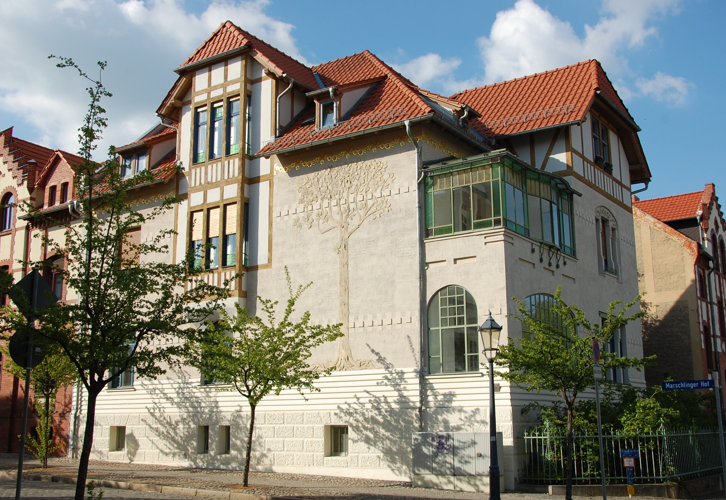 Haus Wallstraße 16 in Quedlinburg, von der Straße Marschlinger Hof aus gesehen